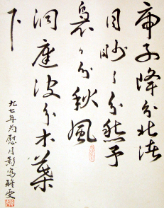 Photographie d'une calligraphie chinoise réalisée par Iris Yawen Hsu.